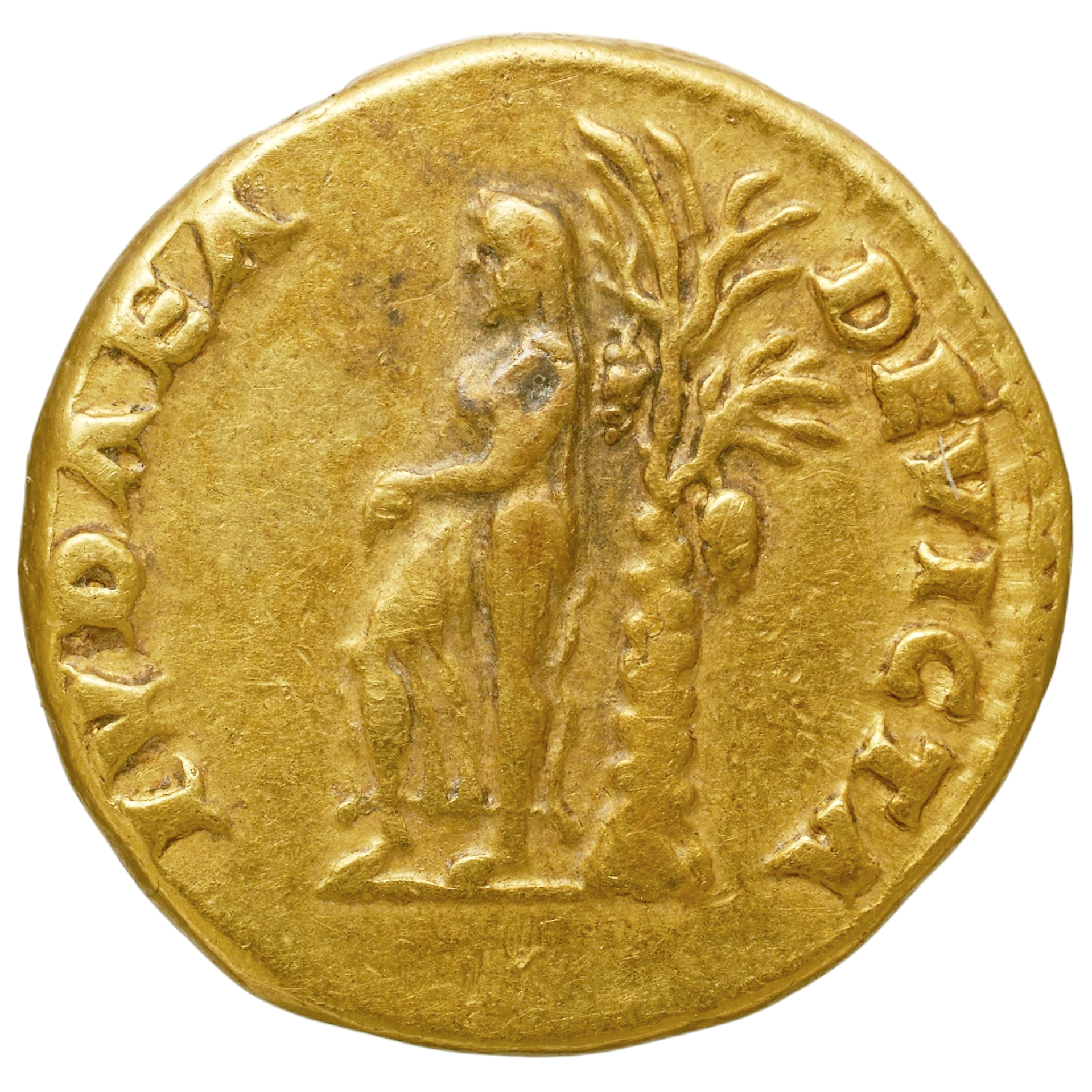 Vespasien, aureus. Revers : IVDAEA DEVICTA - La Judée vaincue personnalisée auprès d'un palmier. Or, 6,10 gr. Rome, vers 80 ap.JC. Collection BnF : IMP-9321